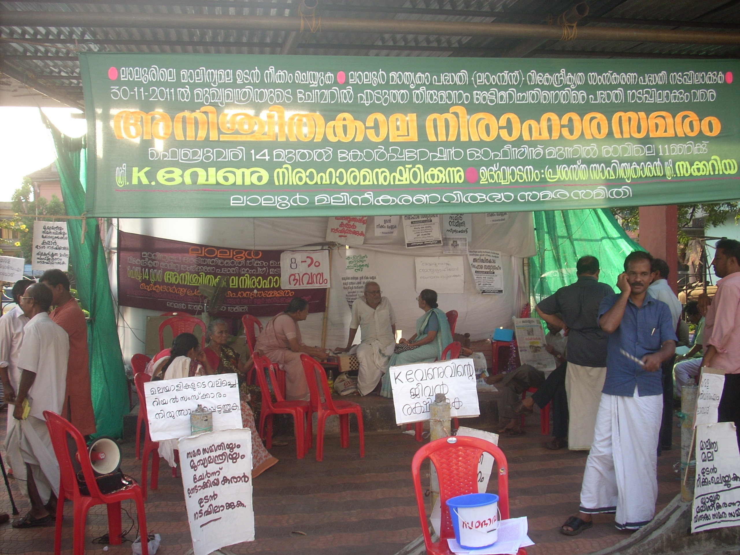 ലാലൂര്‍ സമരത്തെ പിന്തുണച്ചുകൊണ്ട് കെ. വേണുവിന്റെ നിരാഹാരം. തൃശ്ശൂര്‍ കോര്‍പ്പറേഷന്‍ ഓഫീസിന് മുന്‍വശം.